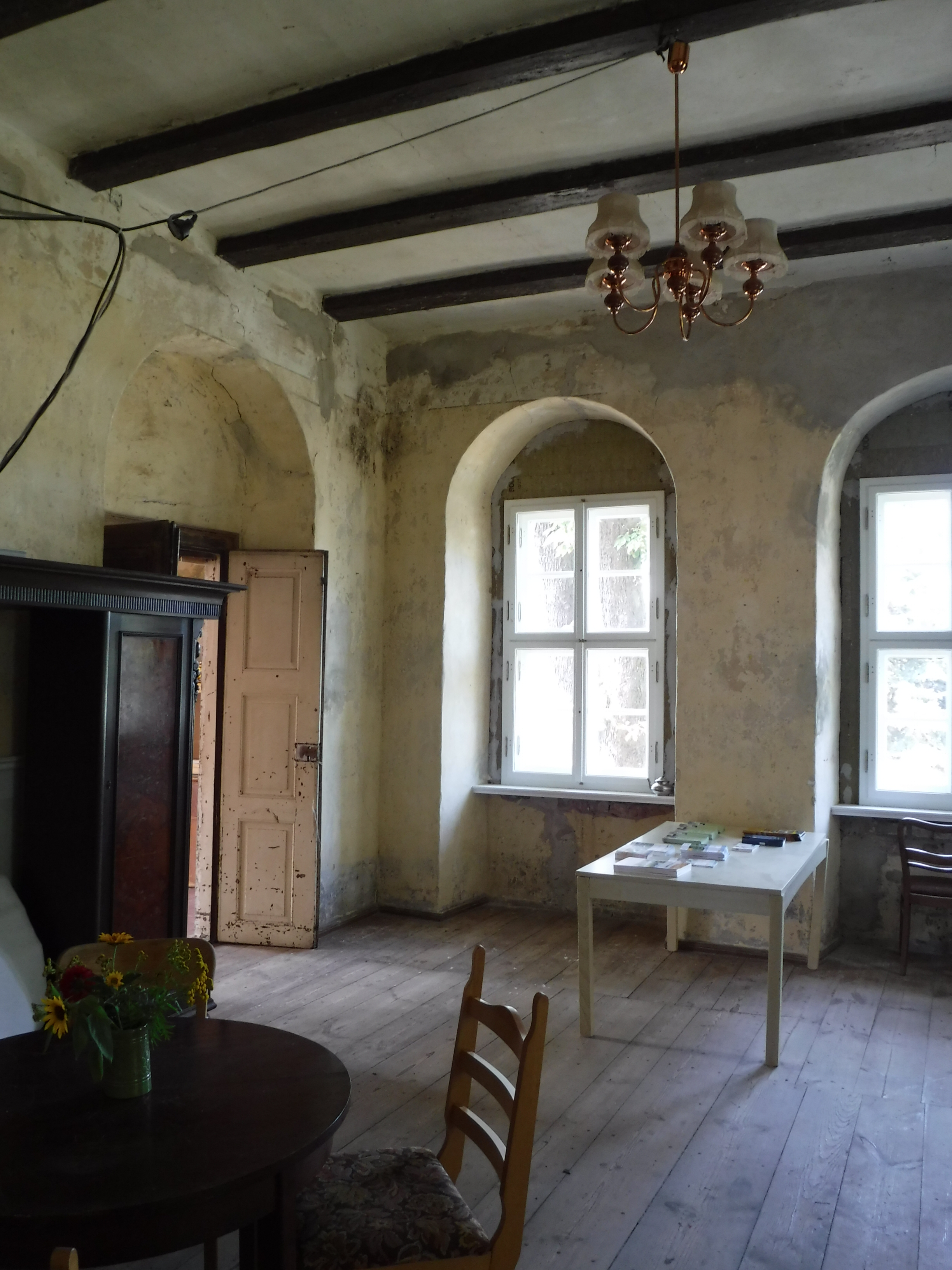 Gutshaus Schwarzbach zum Tag des offenen Denkmals 2016